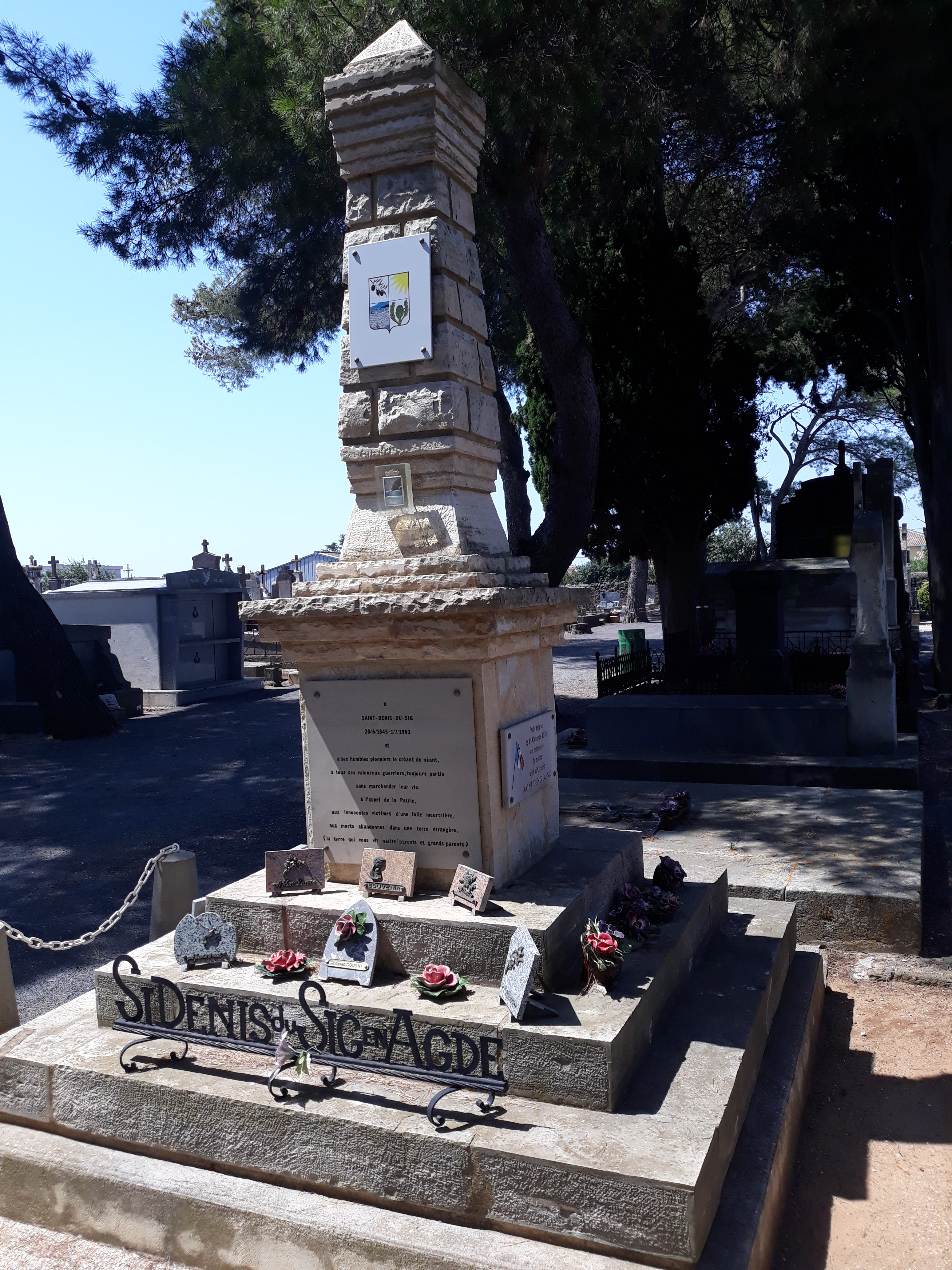 Denkmal für die ehemalige französische Stadt St Denis du Sig (heute Sig) in Algerien auf dem Friedhof von Agde (Hérault).